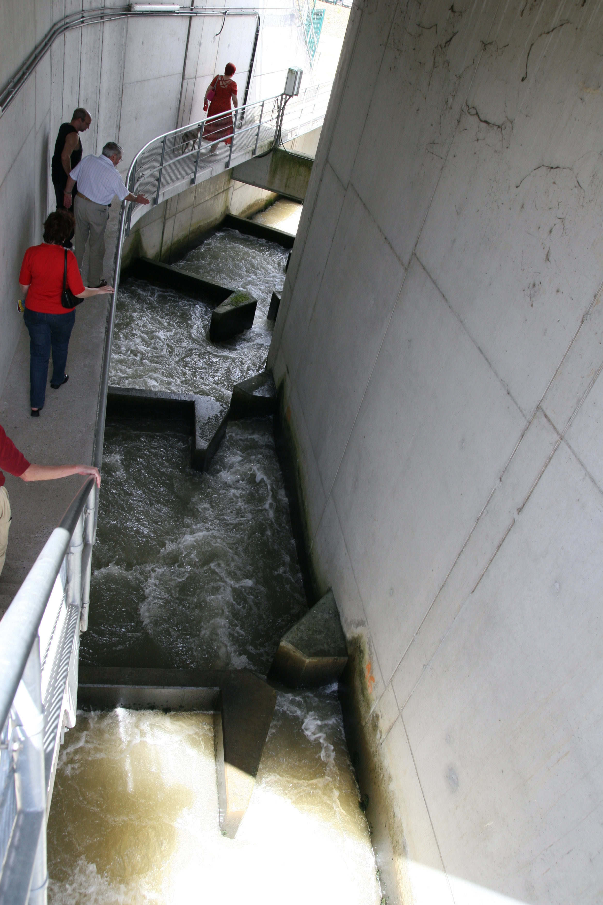 Die Fischtreppe der Iffezheimer Staustufe.